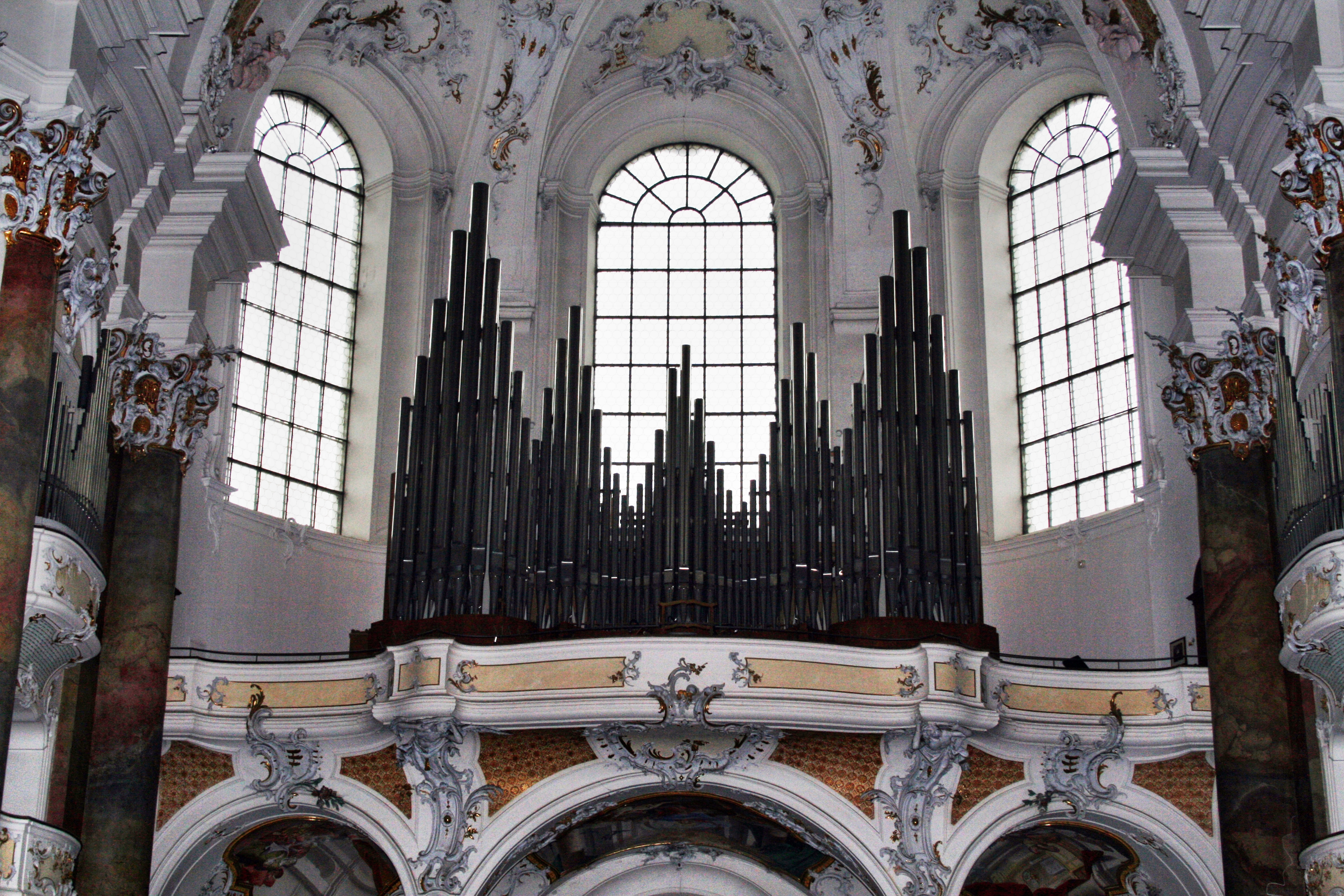 Marienorgel auf der Nordempore des Hauptschiffes (F1), Basilika Ottobeuren